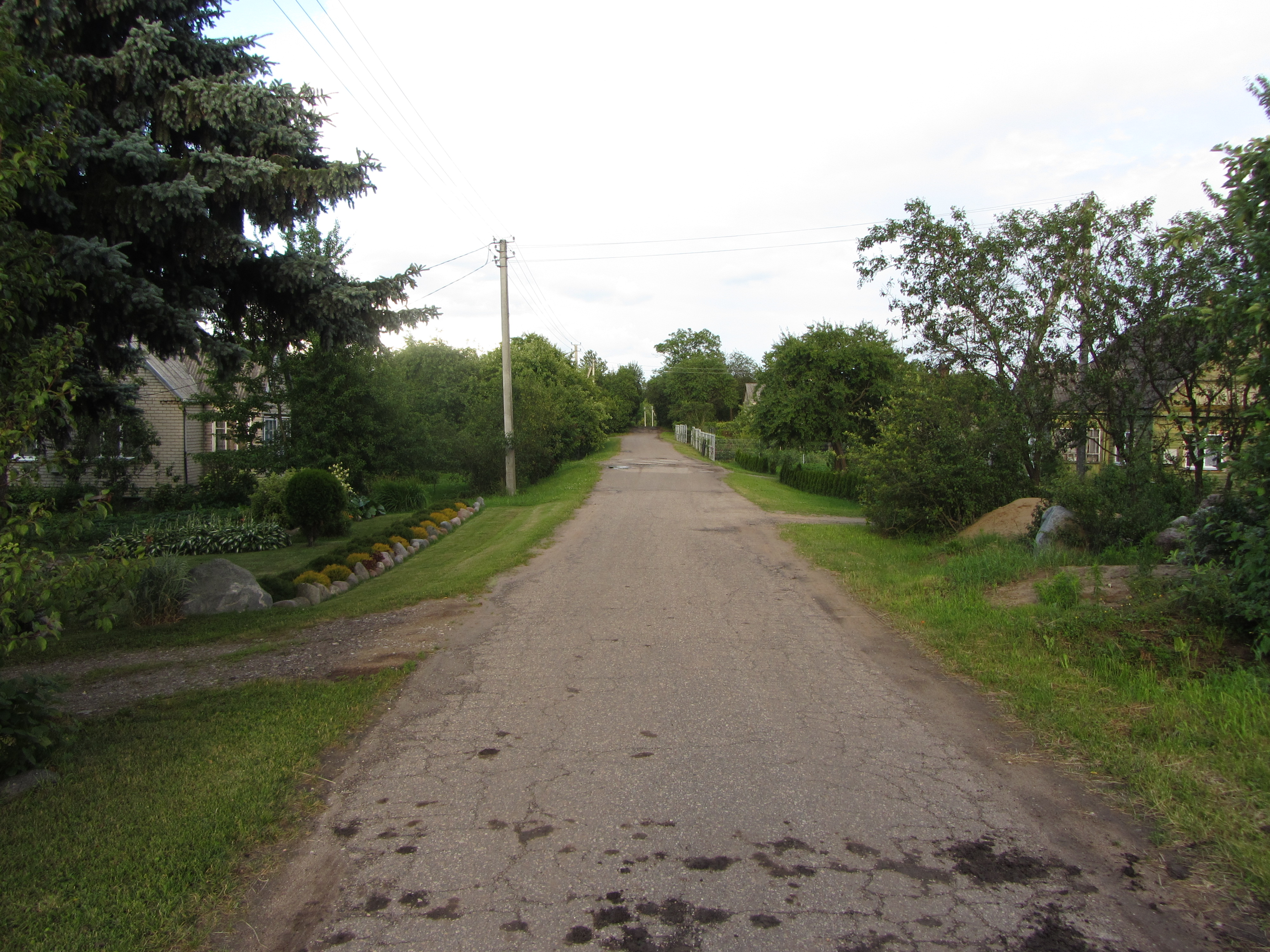 Balceriškės 21367, Lithuania